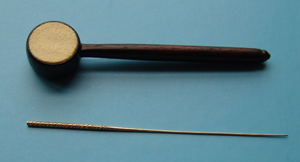 Hammernadel und Hämmerchen für eine von dem japanischen Mönch Mubun entwickelte Akupunkturtherapie (17. Jh.). Sammlung Wolfgang Michel, Fukuoka (Japan).